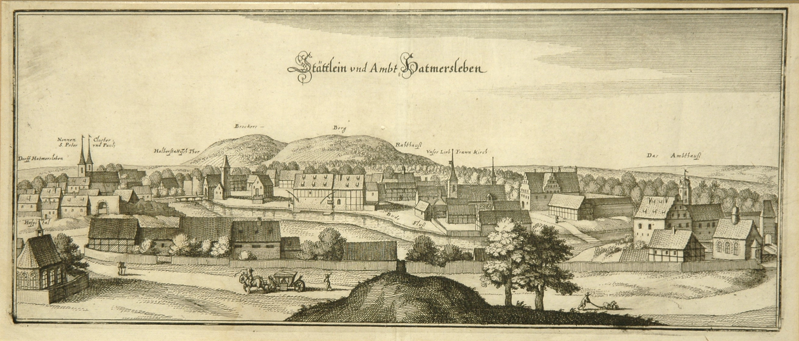 Hadmarsleben um 1650; Kupferstich 13,5 x 33,5 cm von Matthäus Merian 1647